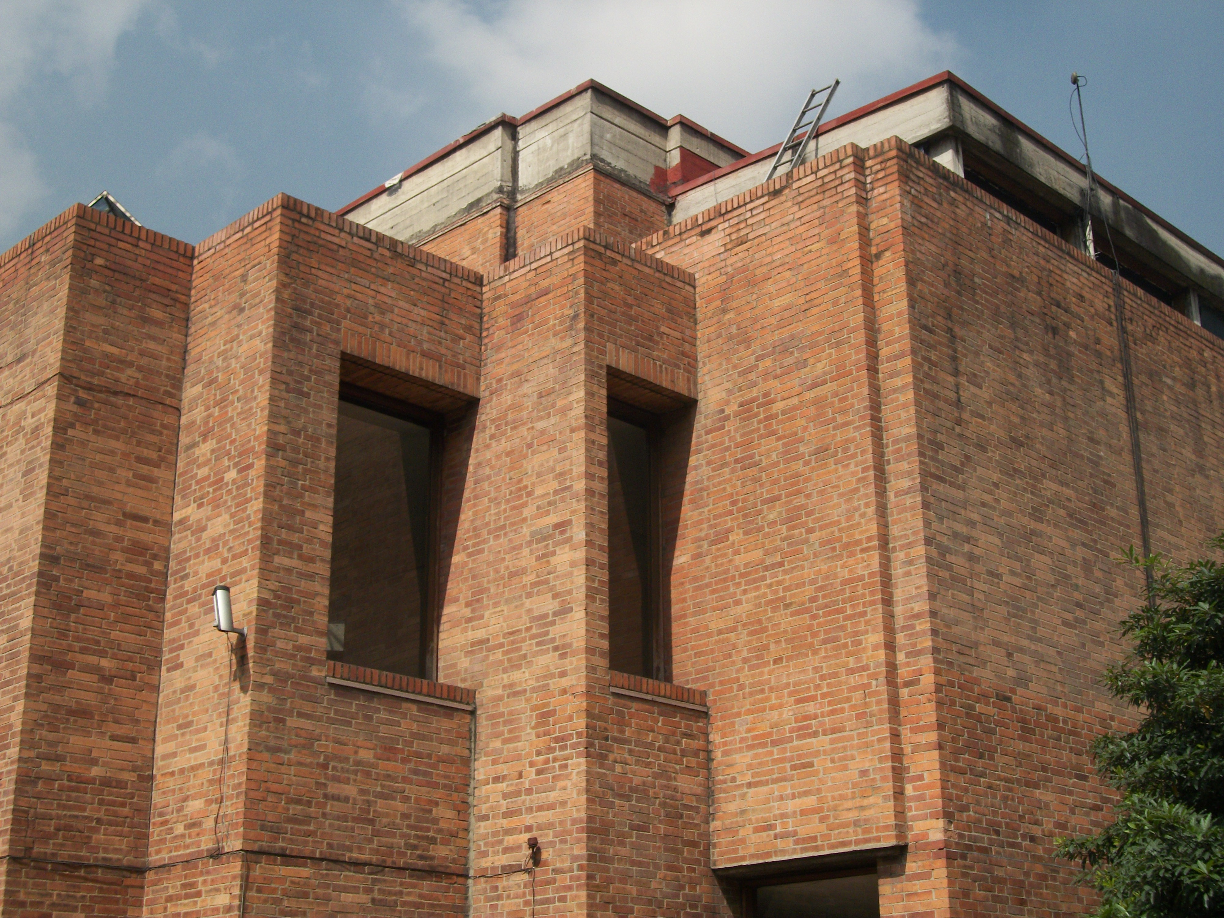 MAMBO Detalles de la esquina nororiental.